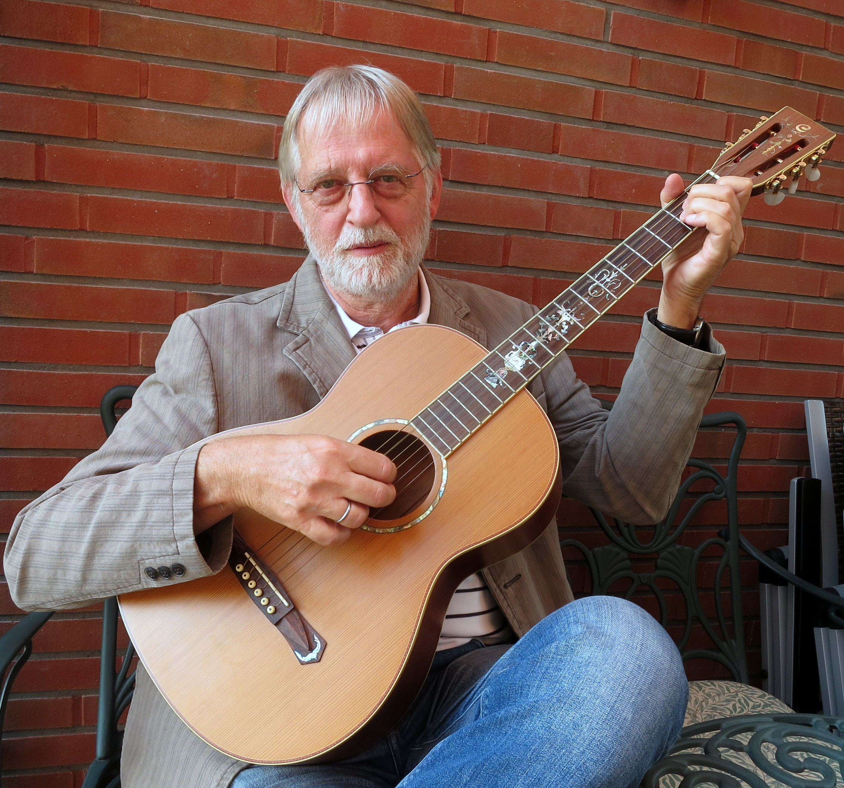 Jah Cornelius auf der Terrasse seiner Leerer Wohnung